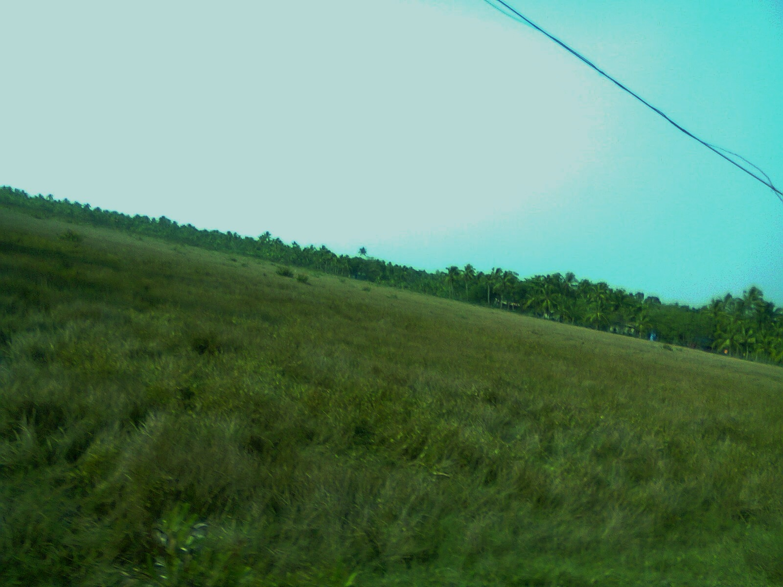 Vechoor Pokkali padam,(rice fields)Vaikkom